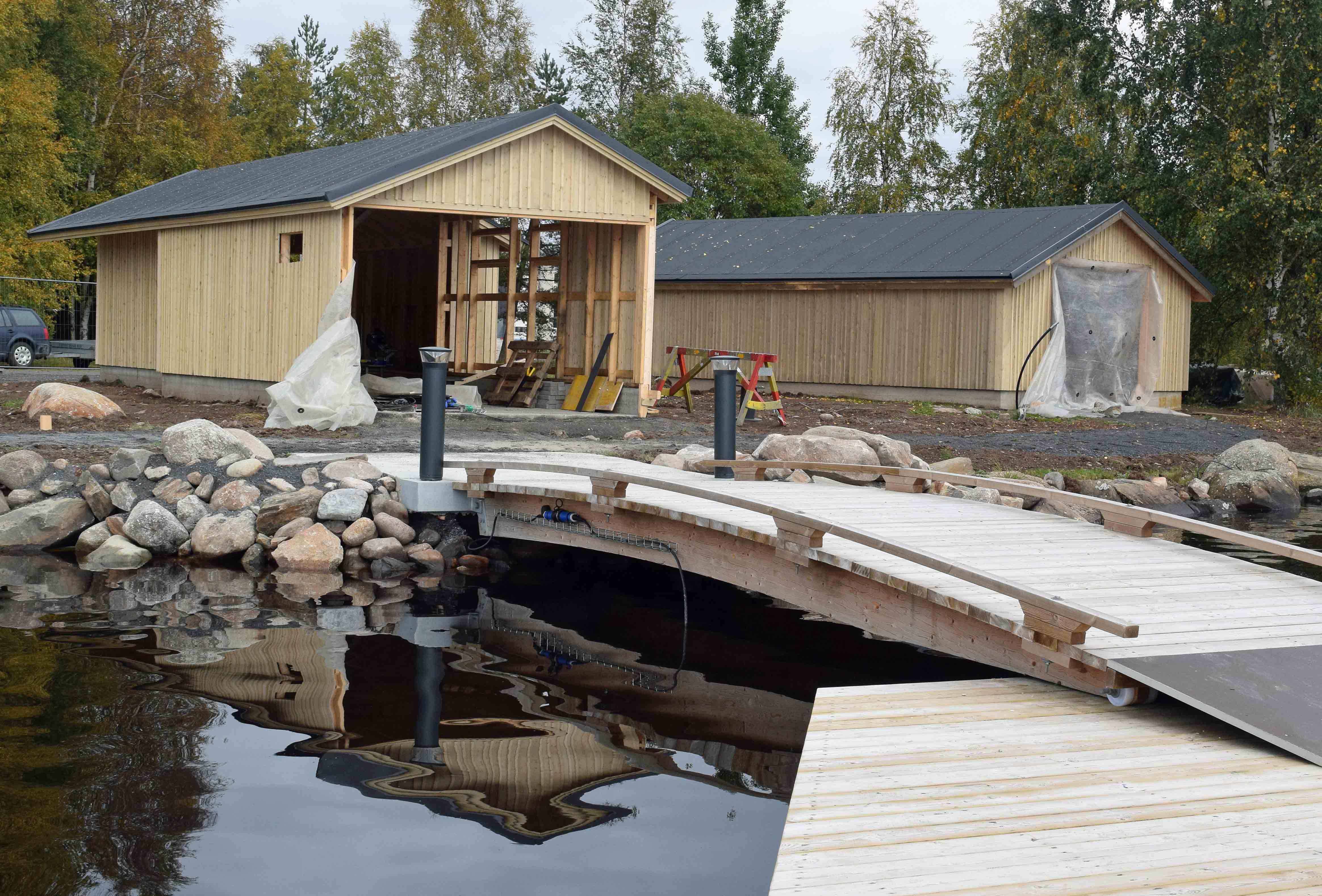 Kyrkösjärven melontakeskus rakenteilla syyskuussa 2017